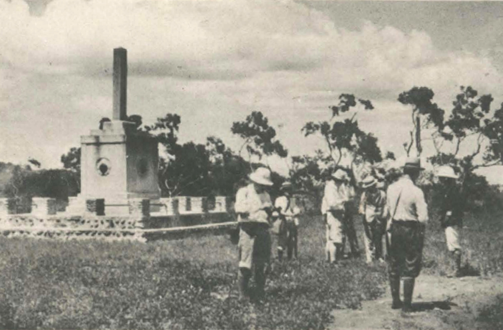 中文（台灣）: 1936年設立的隆恩埔戰役紀念碑，原址在台北大學校園內。